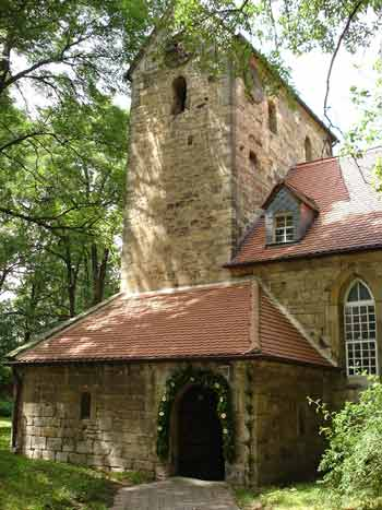 Marienkirche Zorbau